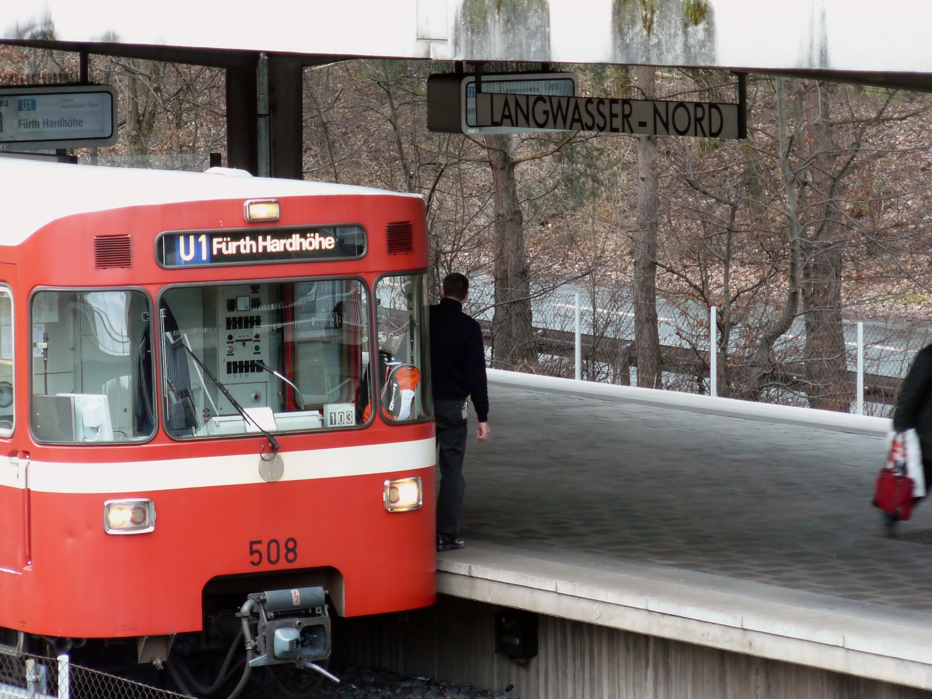 U-Bahnhof Nürnberg Langwasser Nord